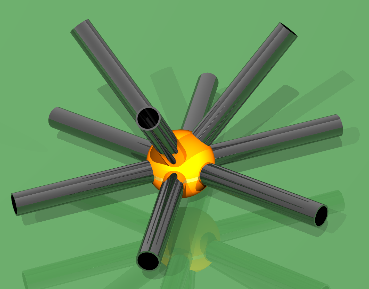 Oktaplatte